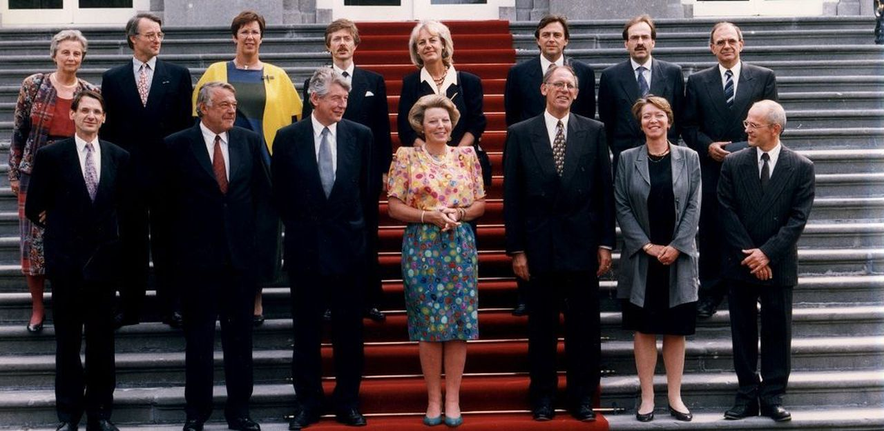 Kabinet-Kok I